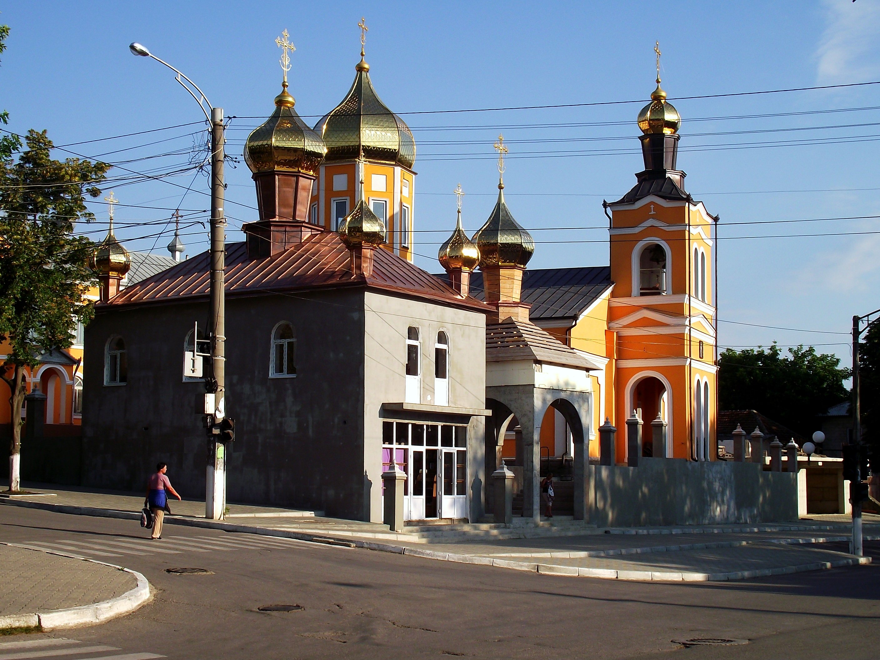 Orhei, Moldova